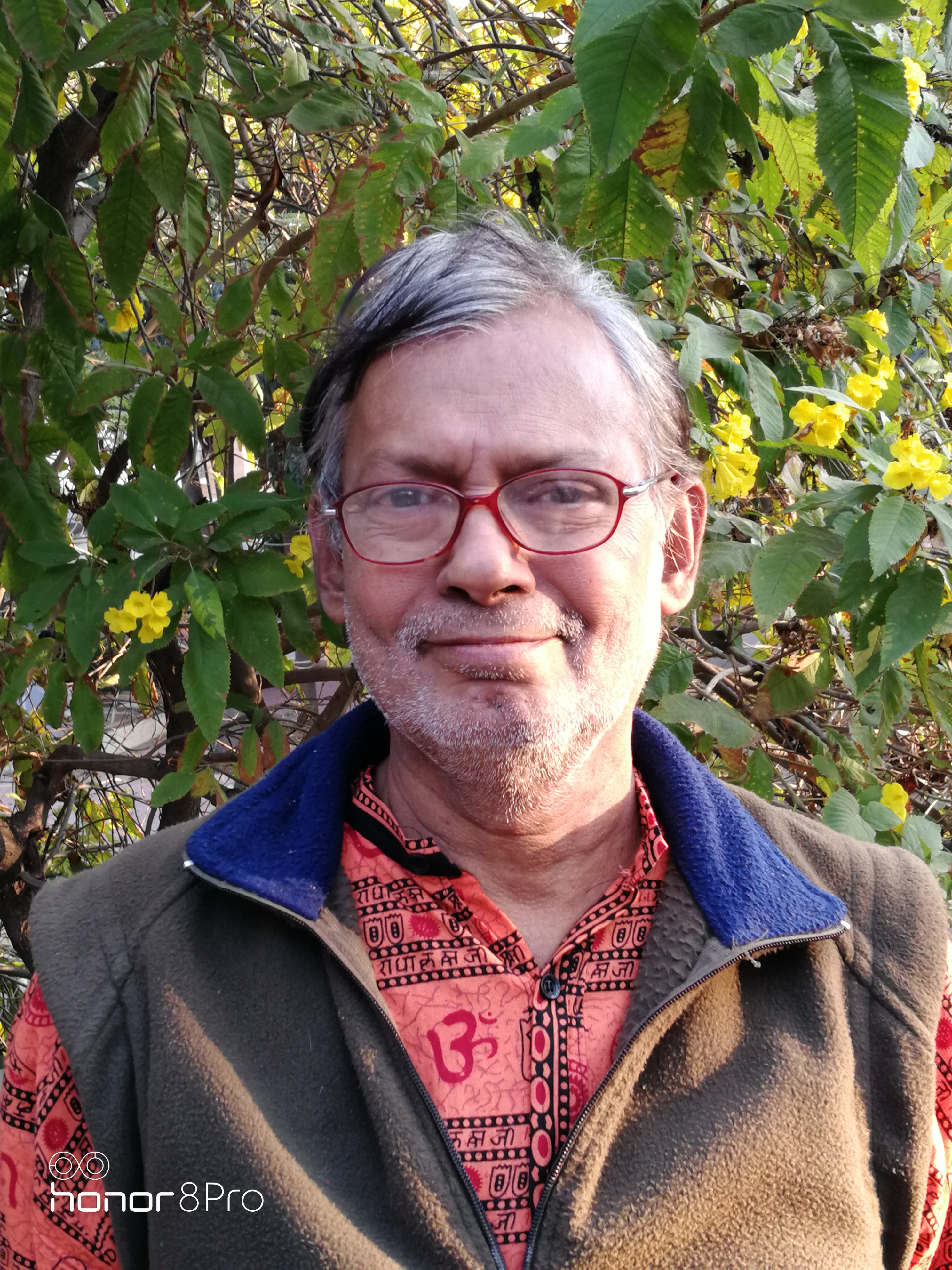 పురాణం శ్రీనివాస శాస్త్రి: పాత్రికేయుడు, తెలుగు కథా రచయిత